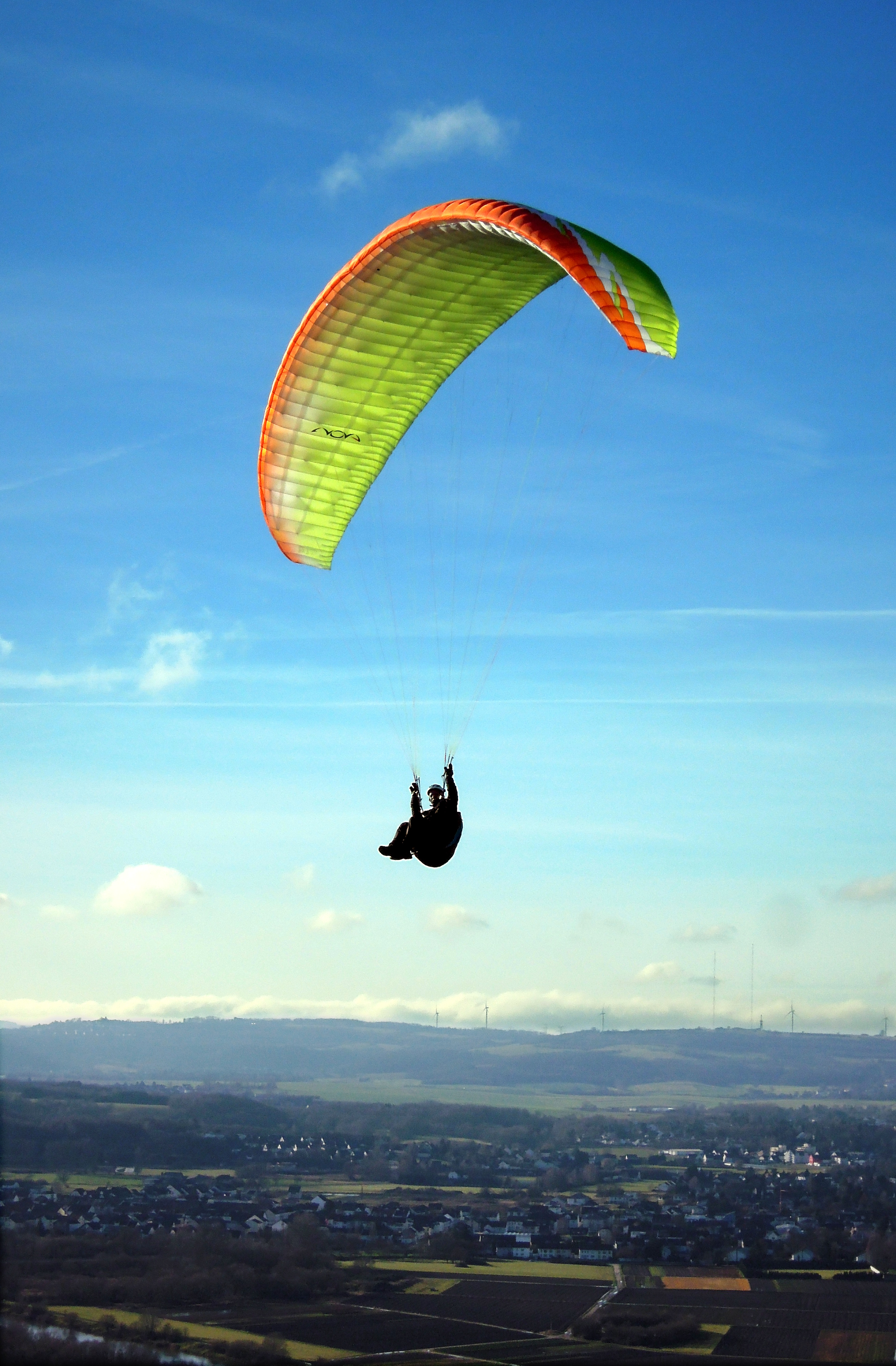 Paragliding an der Bergehalde Ensdorf